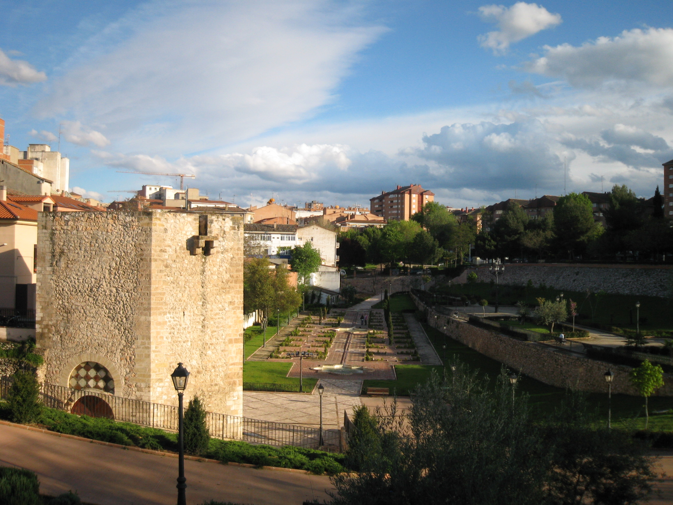 Torreón de Minaya Álvar Fáñez in Guadalajara, Spain